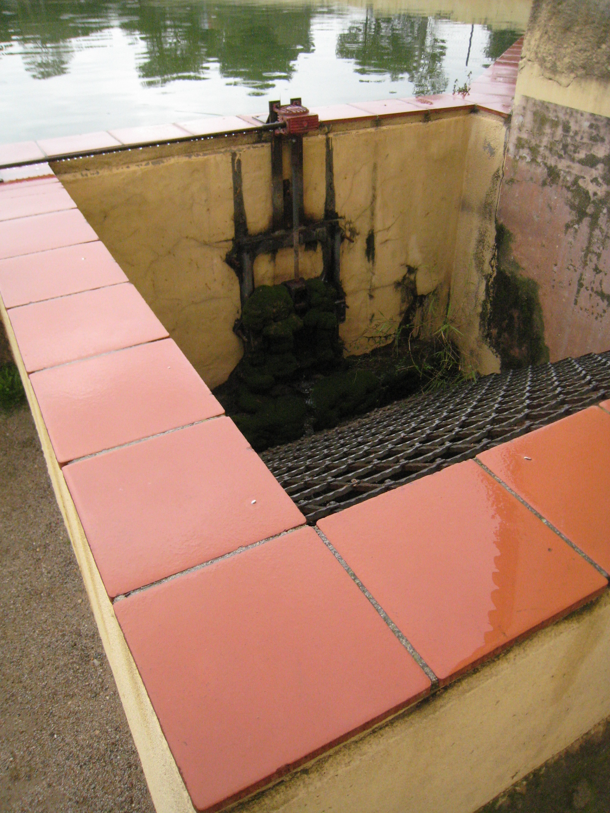 Detall de la bassa que fa funcionar el molí de les tres eres, seu principal del Museu d'Història de Cambrils.